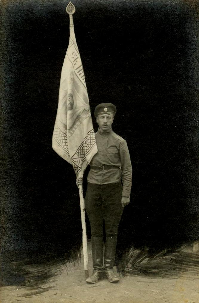 поручик Гринцер (Горчаков) Г.С. со знаменем Пошехонского полка